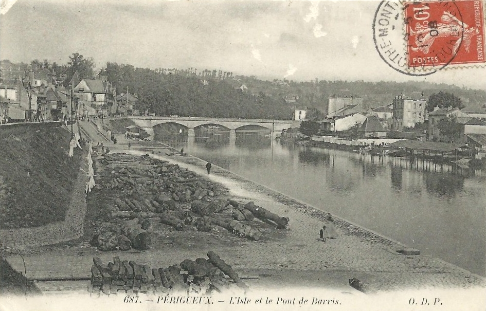 Vue générale du pont des Barris qui traverse l'Isle, à Périgueux (Dordogne, France).